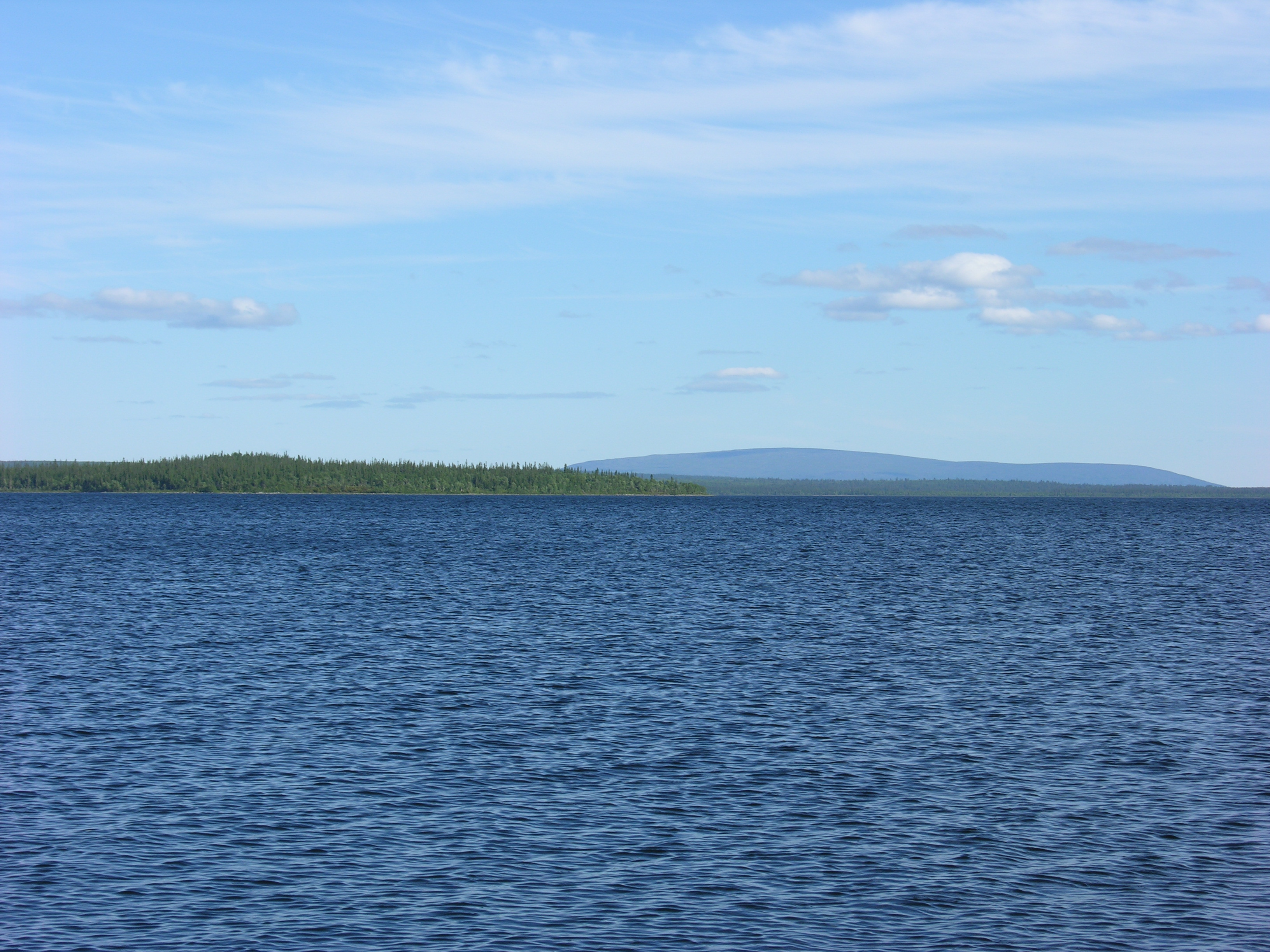 Lovozero Lake